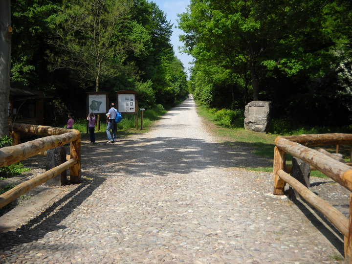 1 Maggio 2010